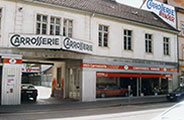 Standort an der Allschwilerstrasse